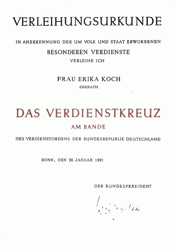 Bundesverdienstkreuz am Bande für Frau Koch, Erkrath, 1991